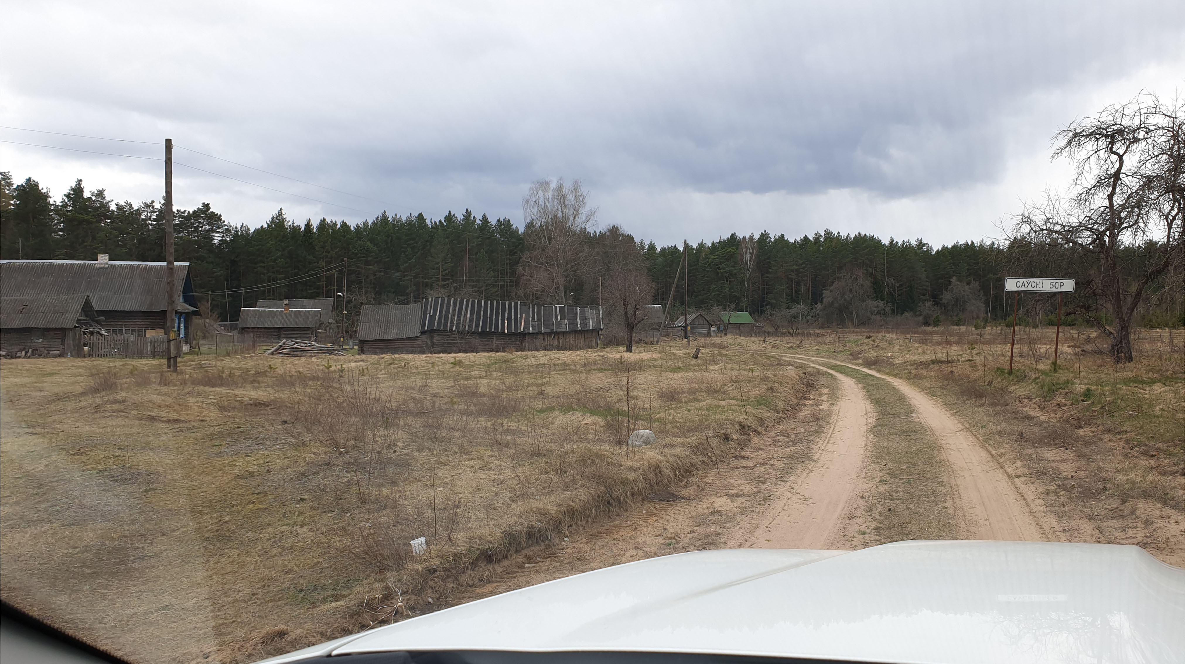 Деревня-хутор Савский Бор находится в самом центре Берлинского заповедника.